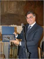 Massimo Milone riceve il "Premio Fondazione Giovanni e Lucia Di Trapani" per la sua attività professionale spesa in favore di Napoli e della Campania.